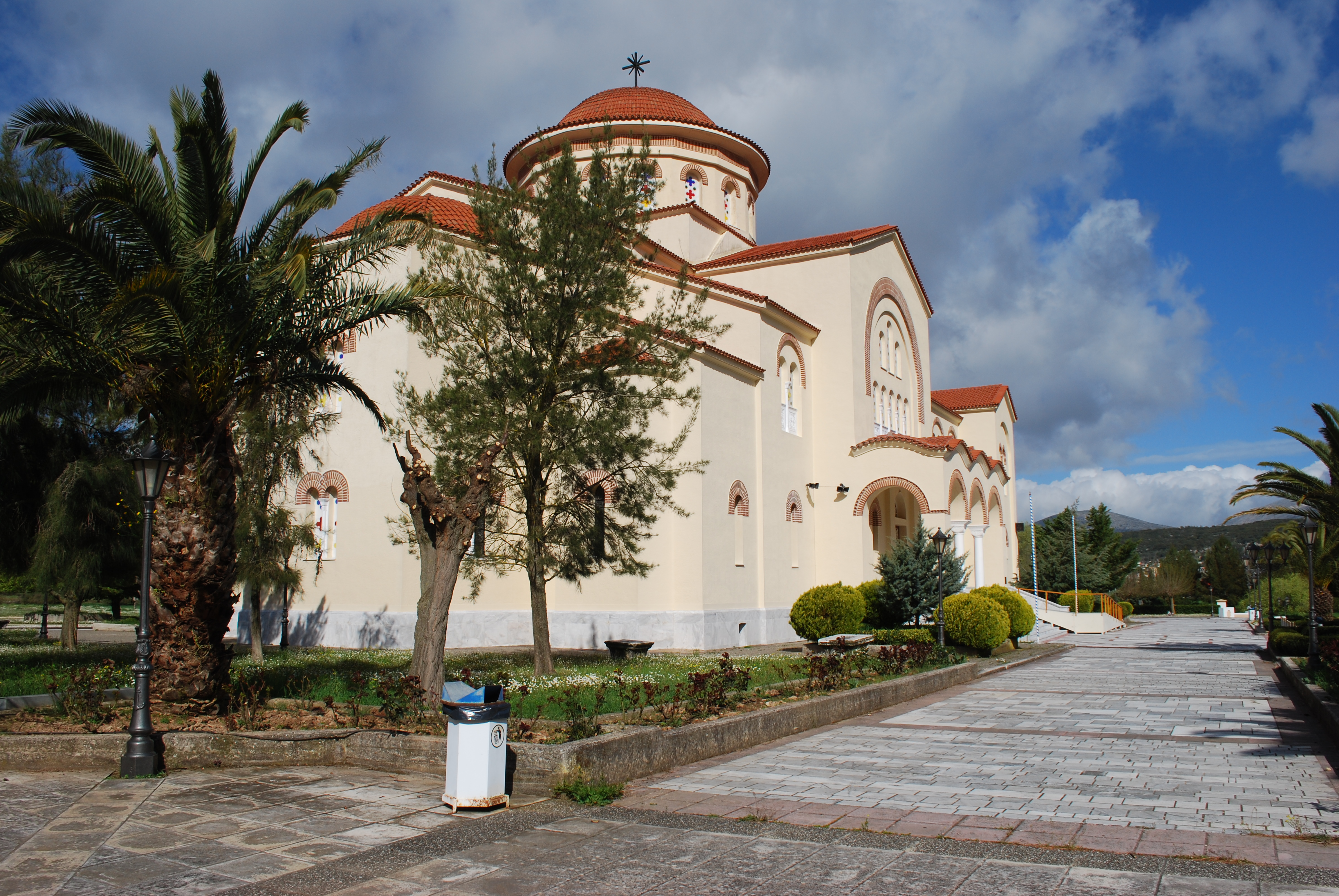 Vue du monastère de Agios Gerasimos à Kephalonia.